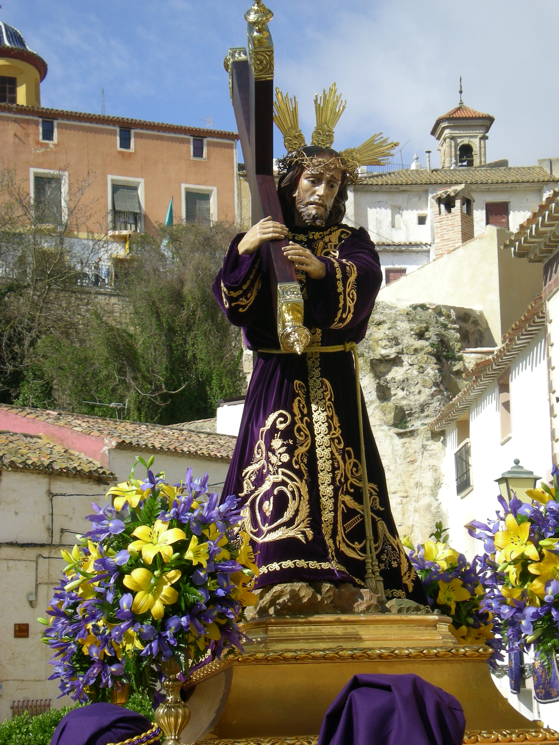 Imagen de Nuestro Padre Jesús Nazareno de Chinchilla (Albacete)